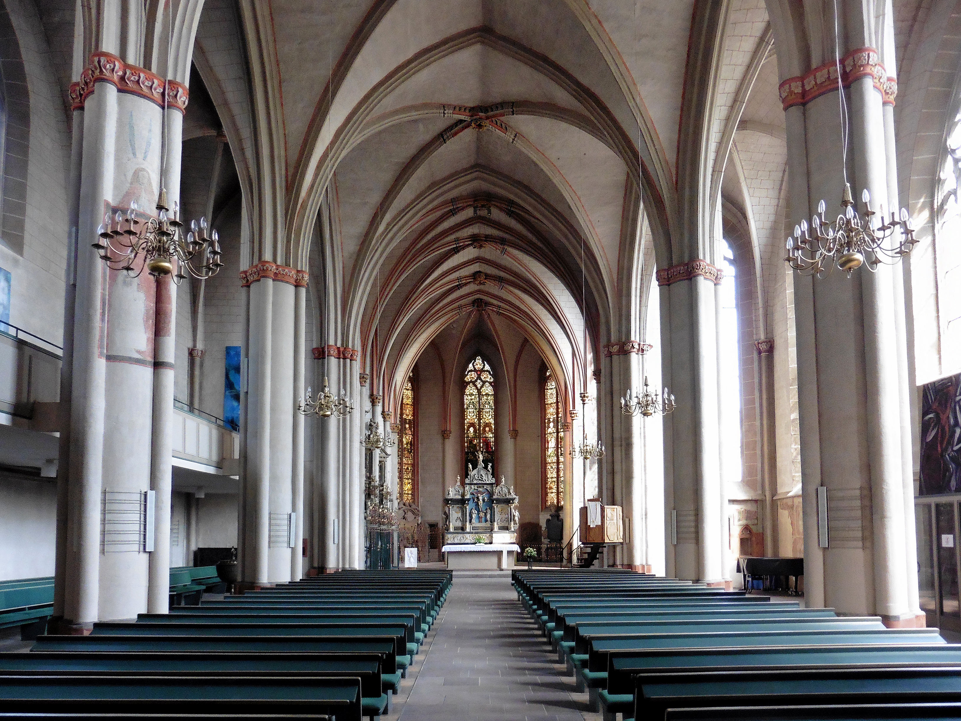 Langhaus und Chor der Lutherischen Pfarrkirche in Marburg. Ansicht von Westsüdwest.